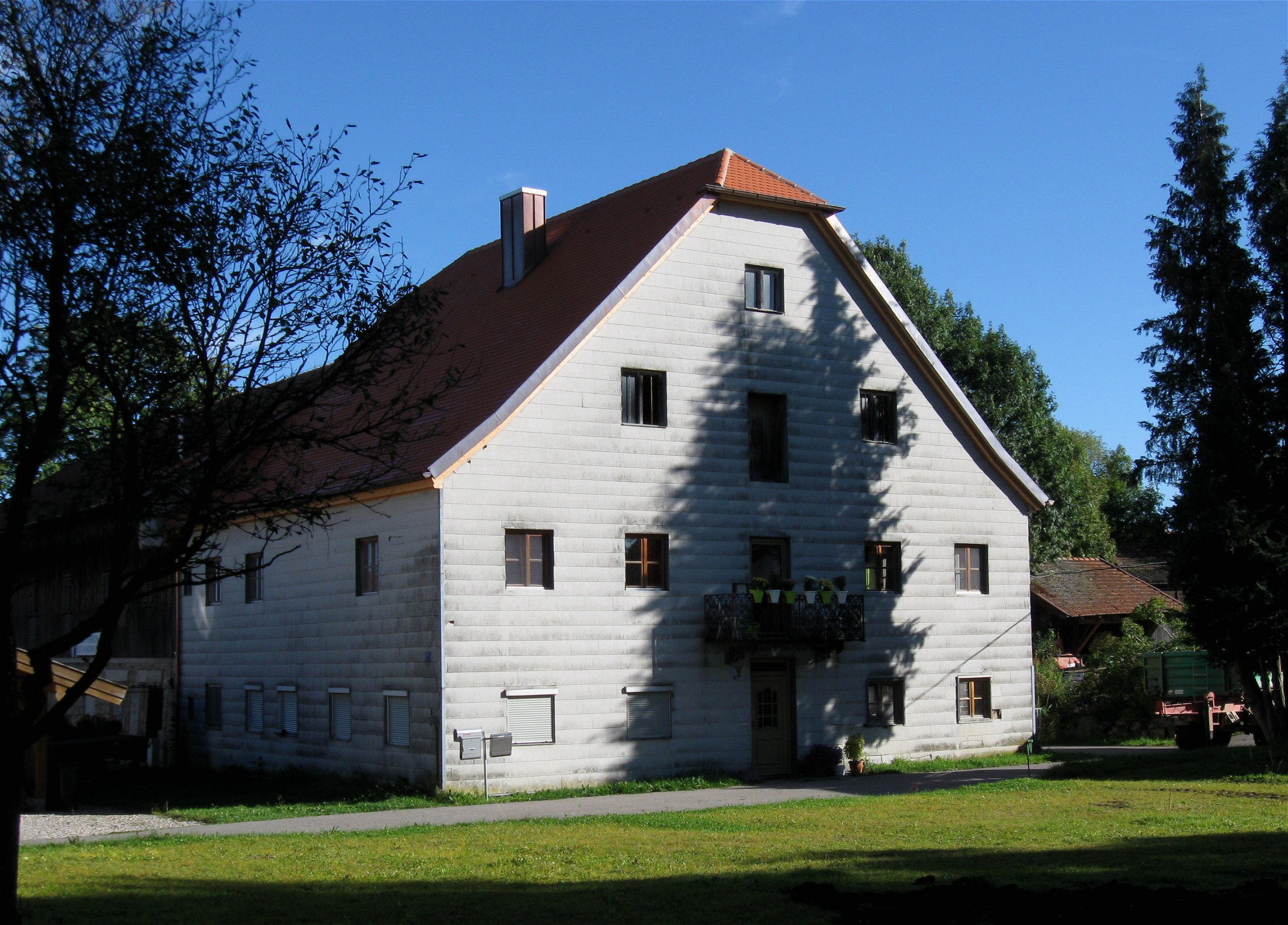 Gruber Straße 3; Beim Jagerbauer, Bauernhaus, stattlicher Massivbau mit steilem Krüppelwalmdach. Wohl 18. Jahrhundert.